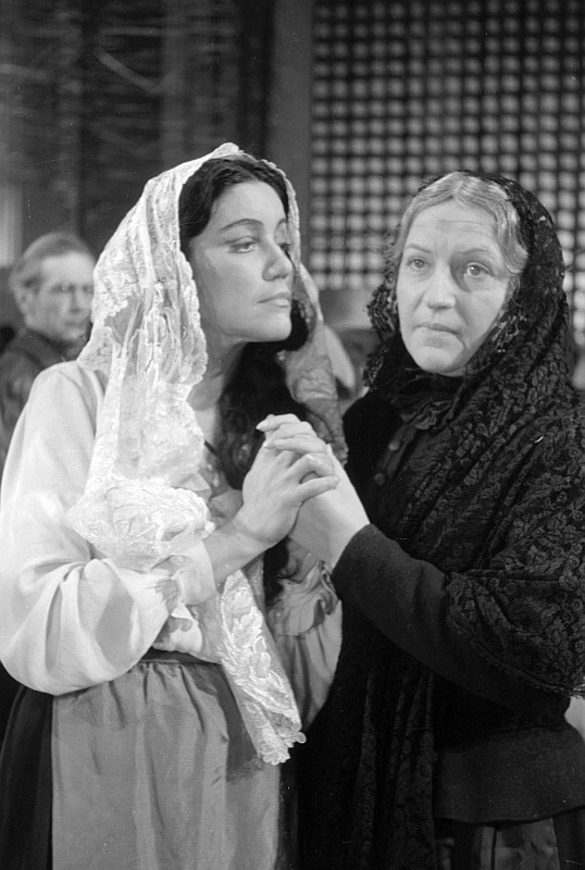 Original image description from the Deutsche Fotothek Szenenbilder